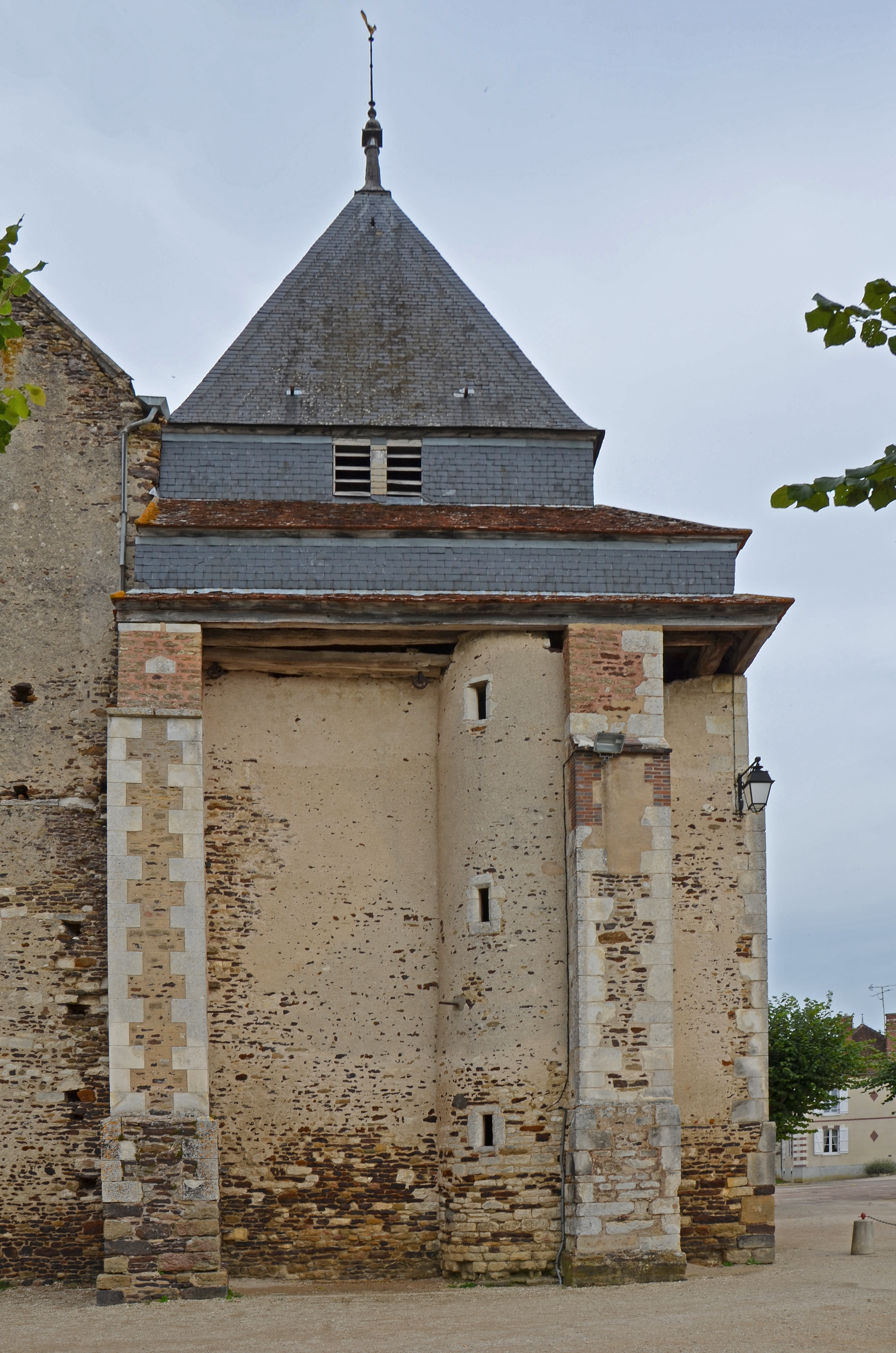 Église de Héry, Yonne, Bourgogne, France